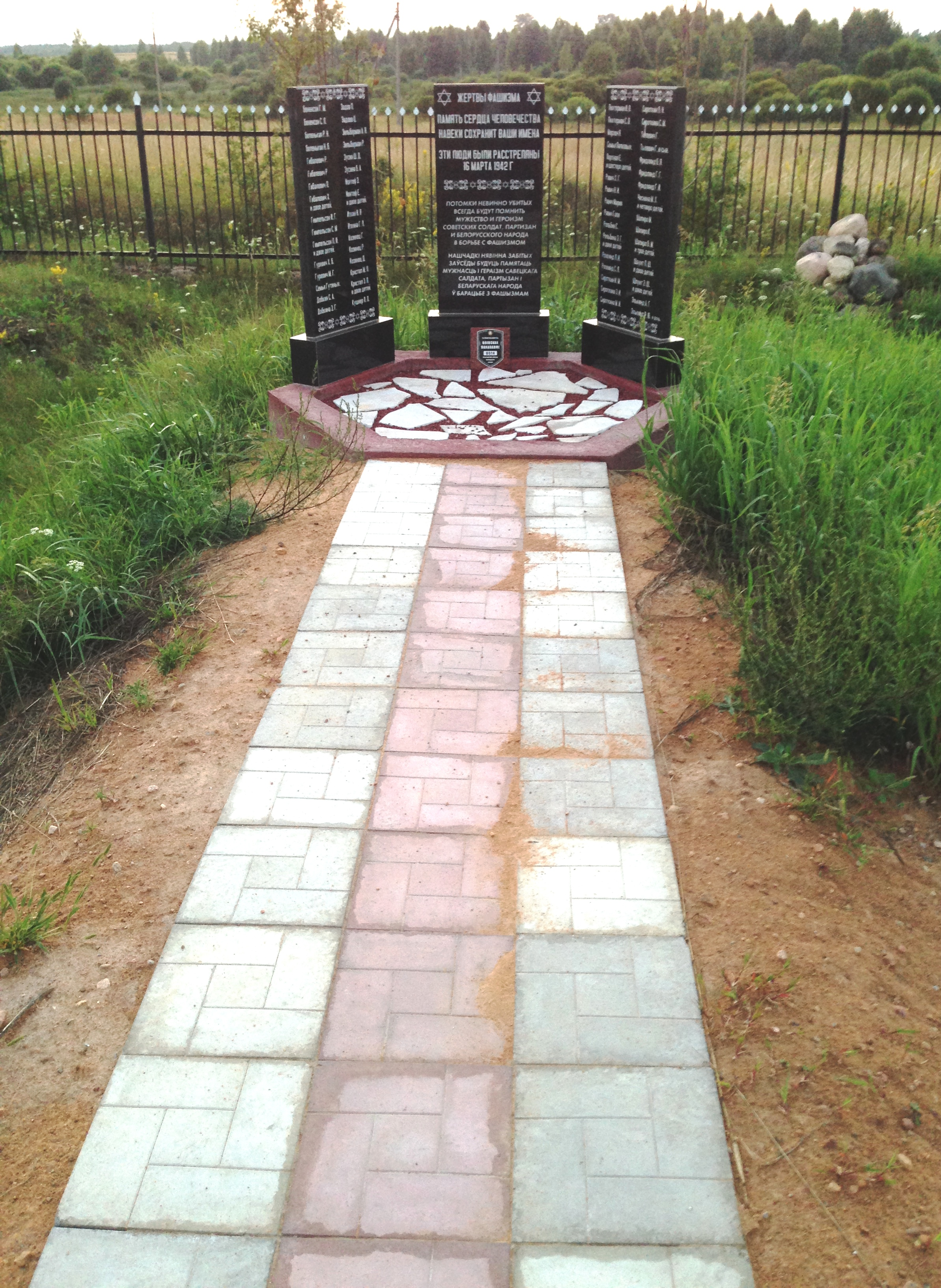 Новый памятник евреям деревни Славное Толочинского района, убитым нацистами 15 марта 1942 года.